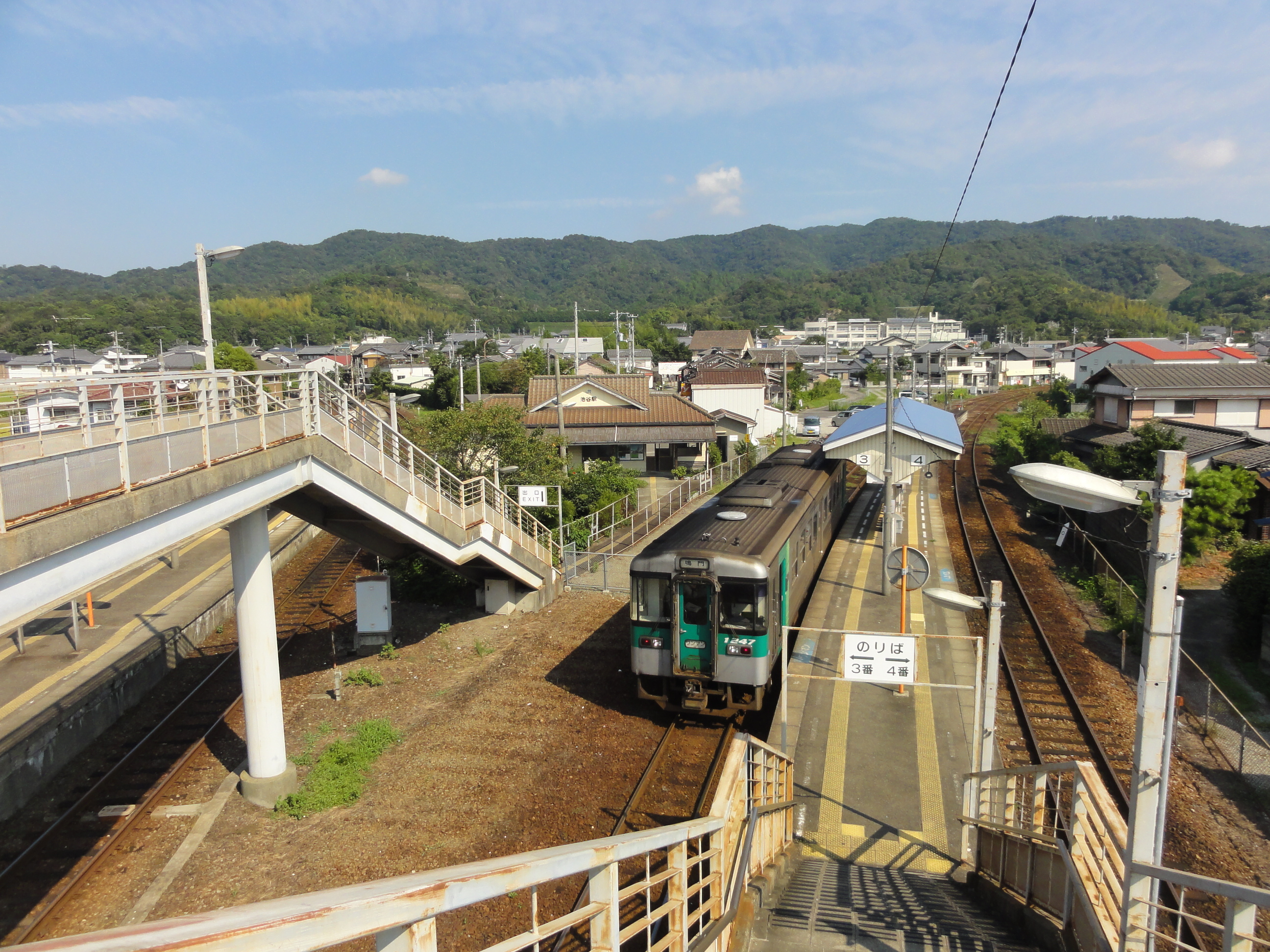 池谷駅構内